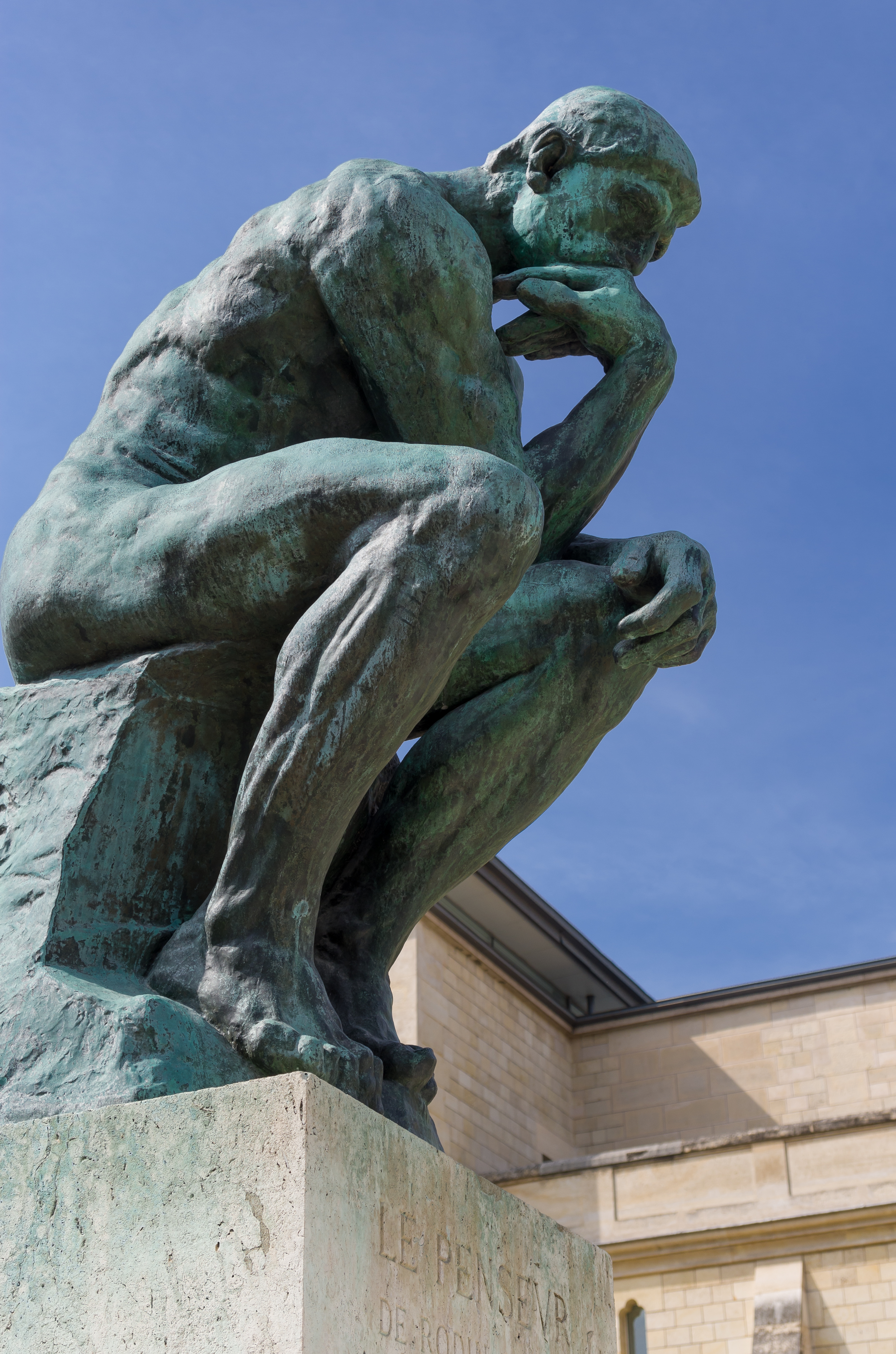 Le Penseur in the Jardin du Musée Rodin, Paris.